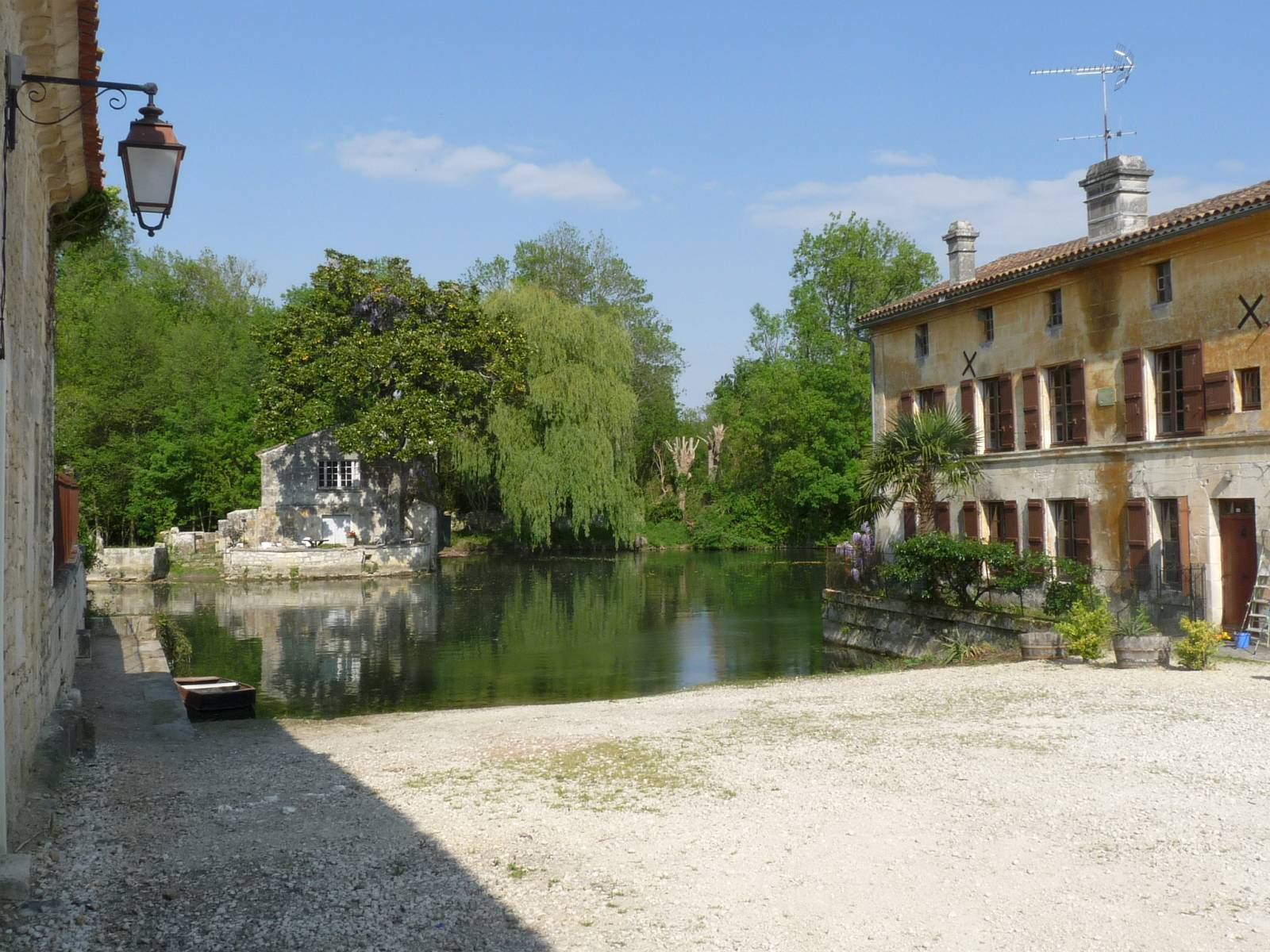 Saintonge, Saint-Même-les-Carrières (16), France